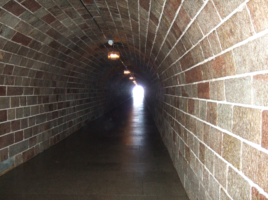 Tunnel zum Lift des Kehlsteinhauses